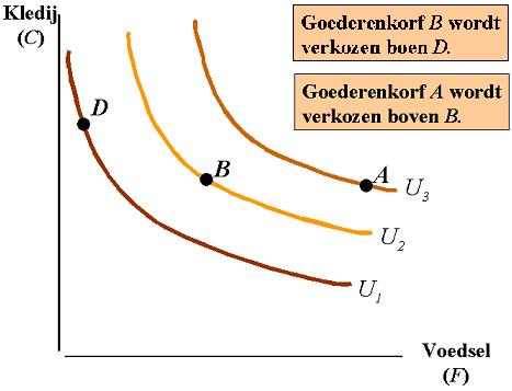 Indifferentiecurve